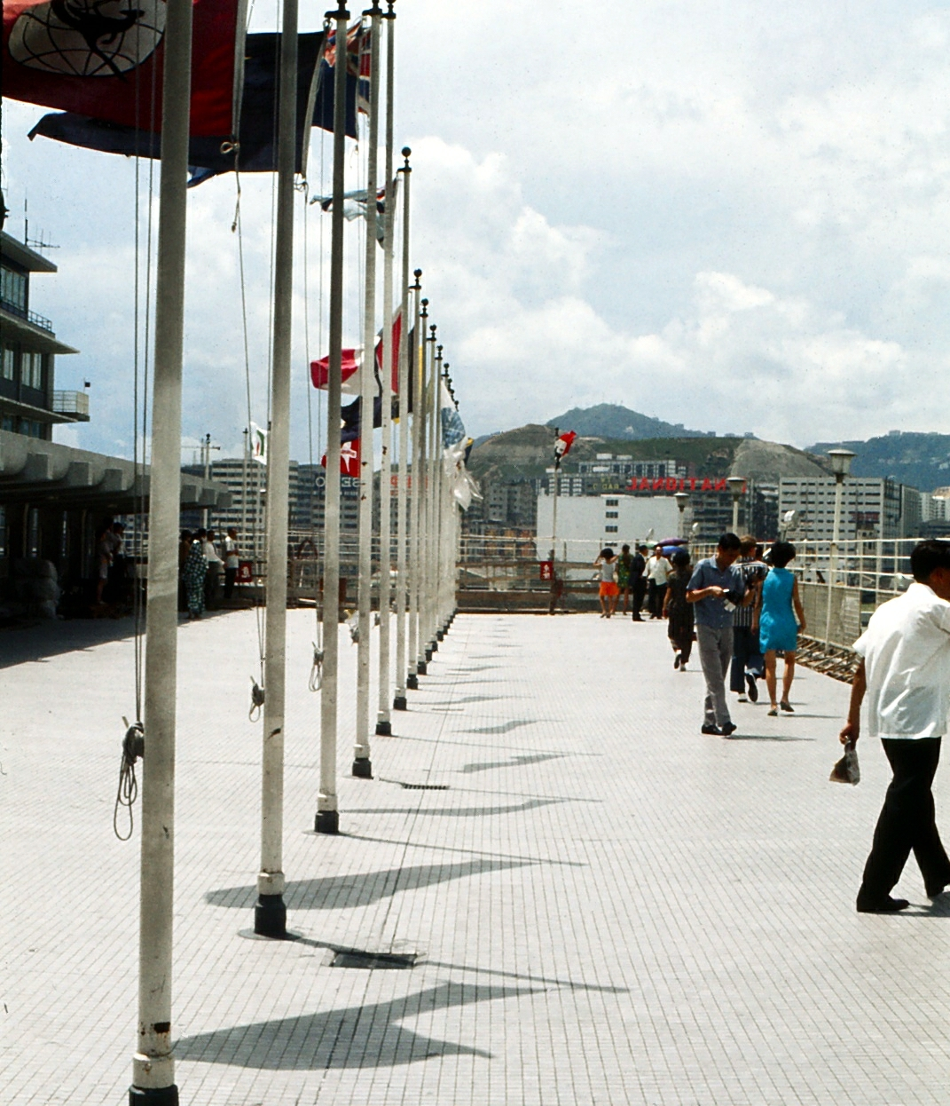 Hong Kong Kai Tak Airport Podium